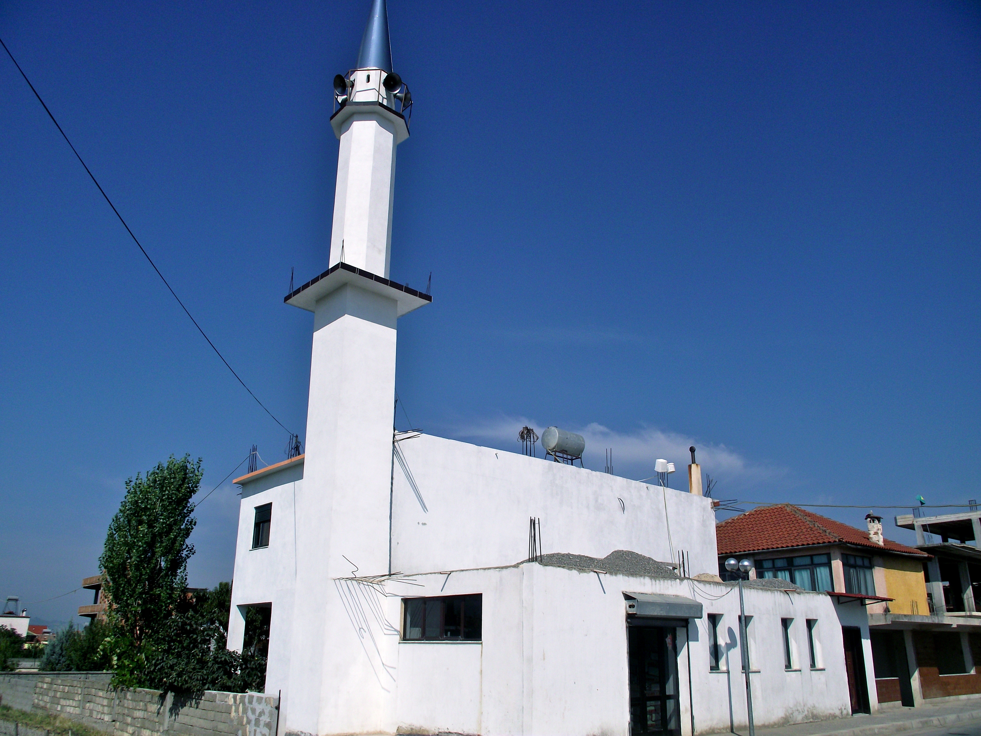 Minareto nel quartiere di Bathore